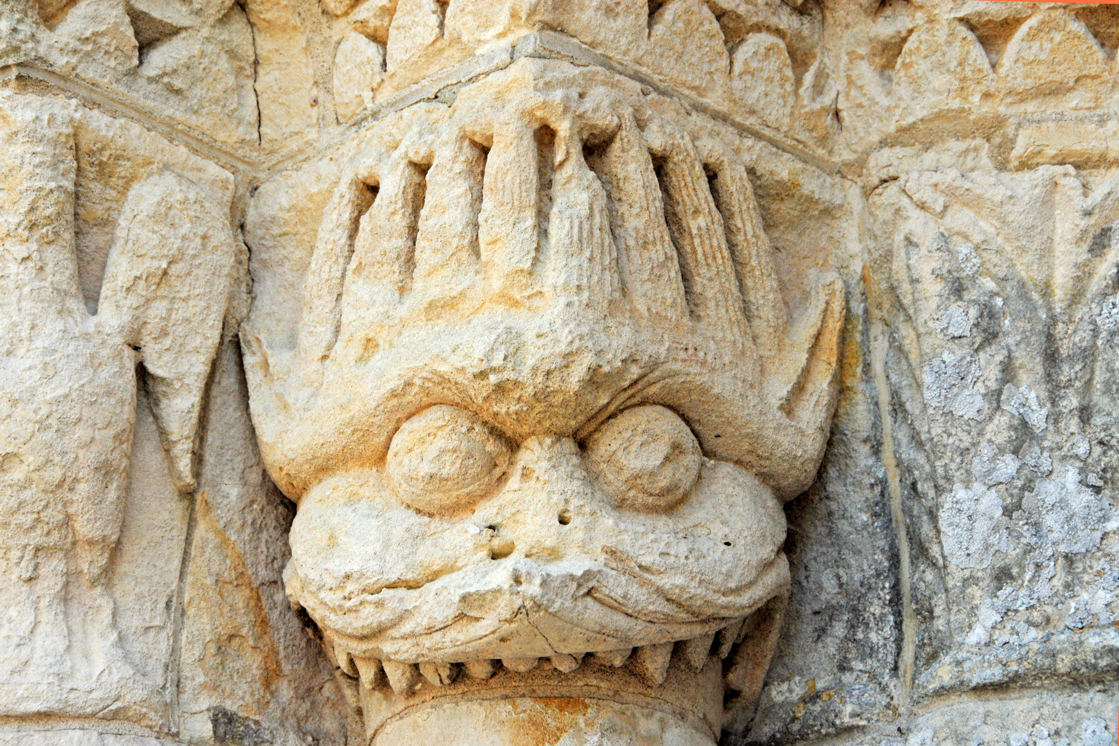 Chadenac, Kapitell, linkes Blindportal